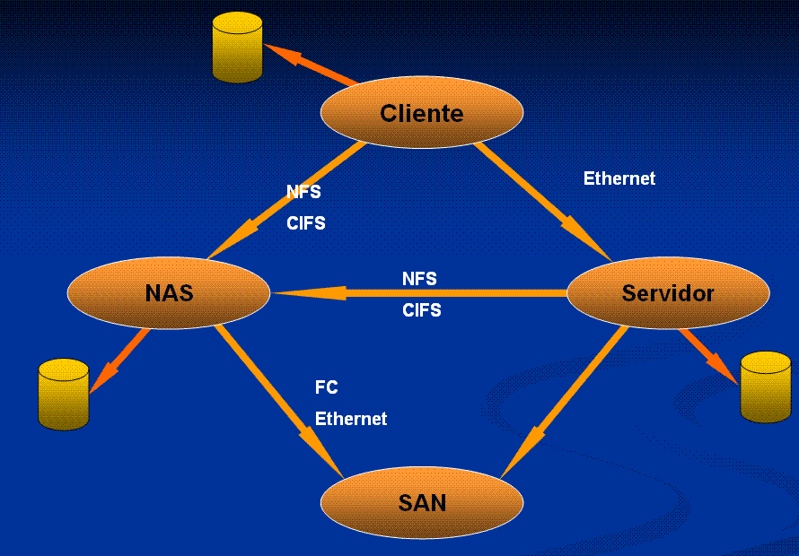 Gráfico de la interrelacion entre diferentes sistemas de almacenamiento